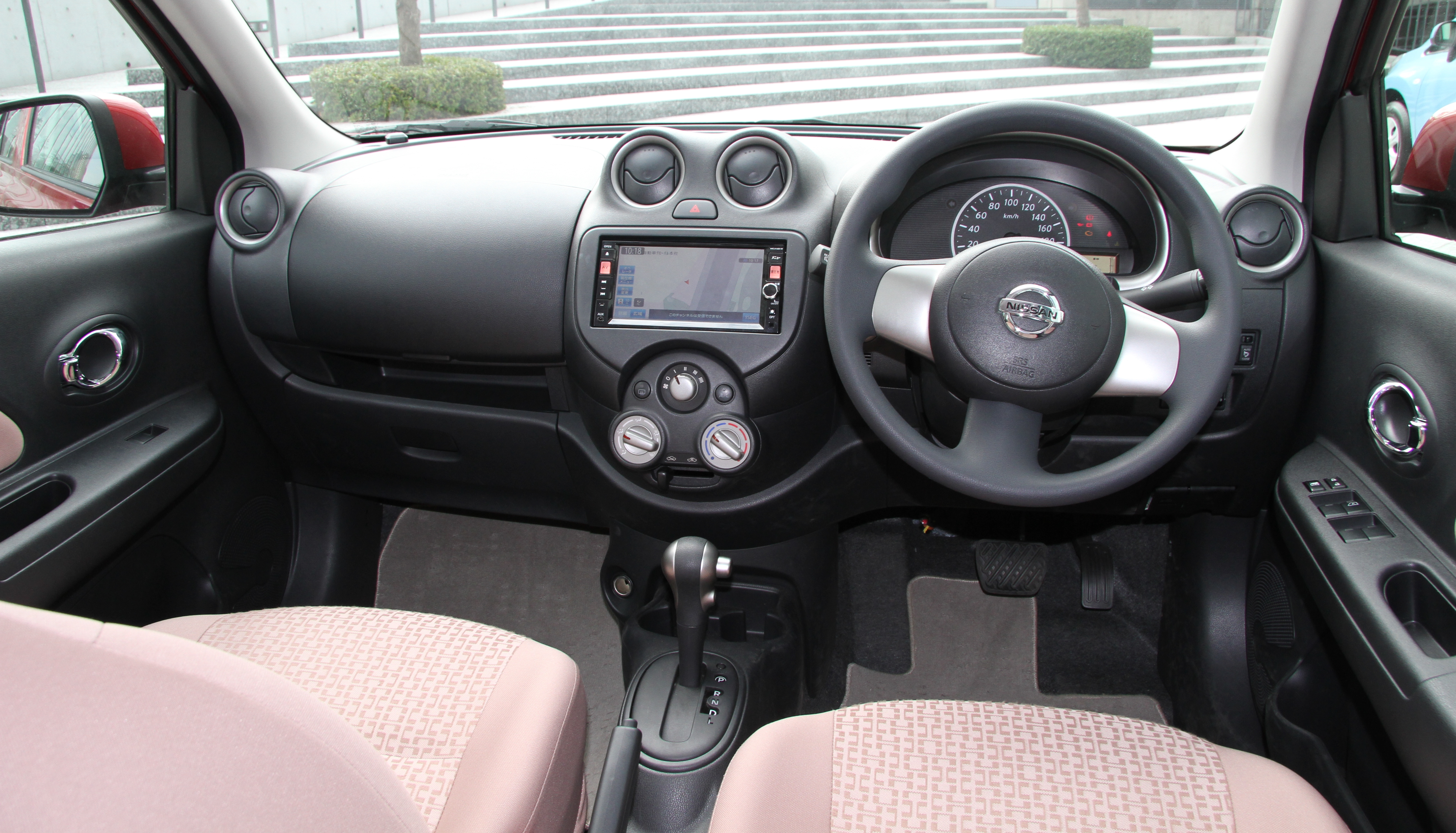 Nissan Moco